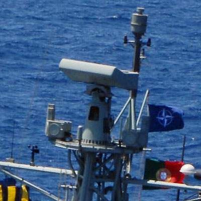 Радар Thales MW-08 на португальском фрегате F332 «Корте Реаль»